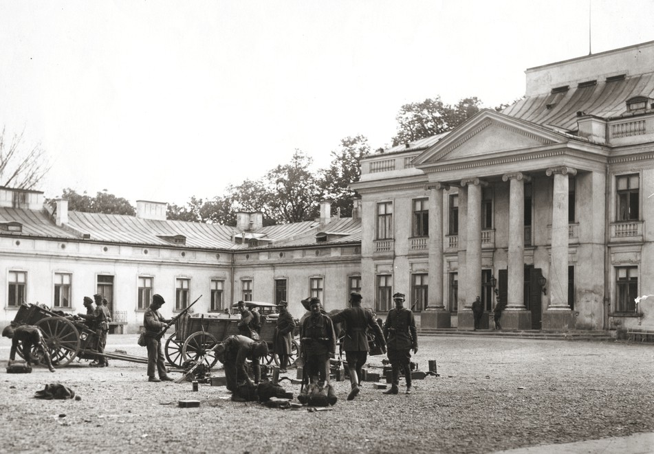 Zbieranie broni i amunicji pozostawionej przez wojska rządowe przed Belwederem (ówczesnej rezydencji prezydenta RP) opanowanym przez wojska Józefa Piłsudskiego podczas zamachu majowego w 1926 r.